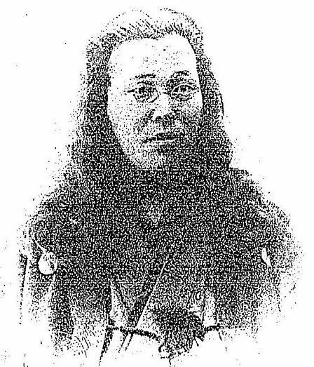 森肇。弁護士。女優森律子の父